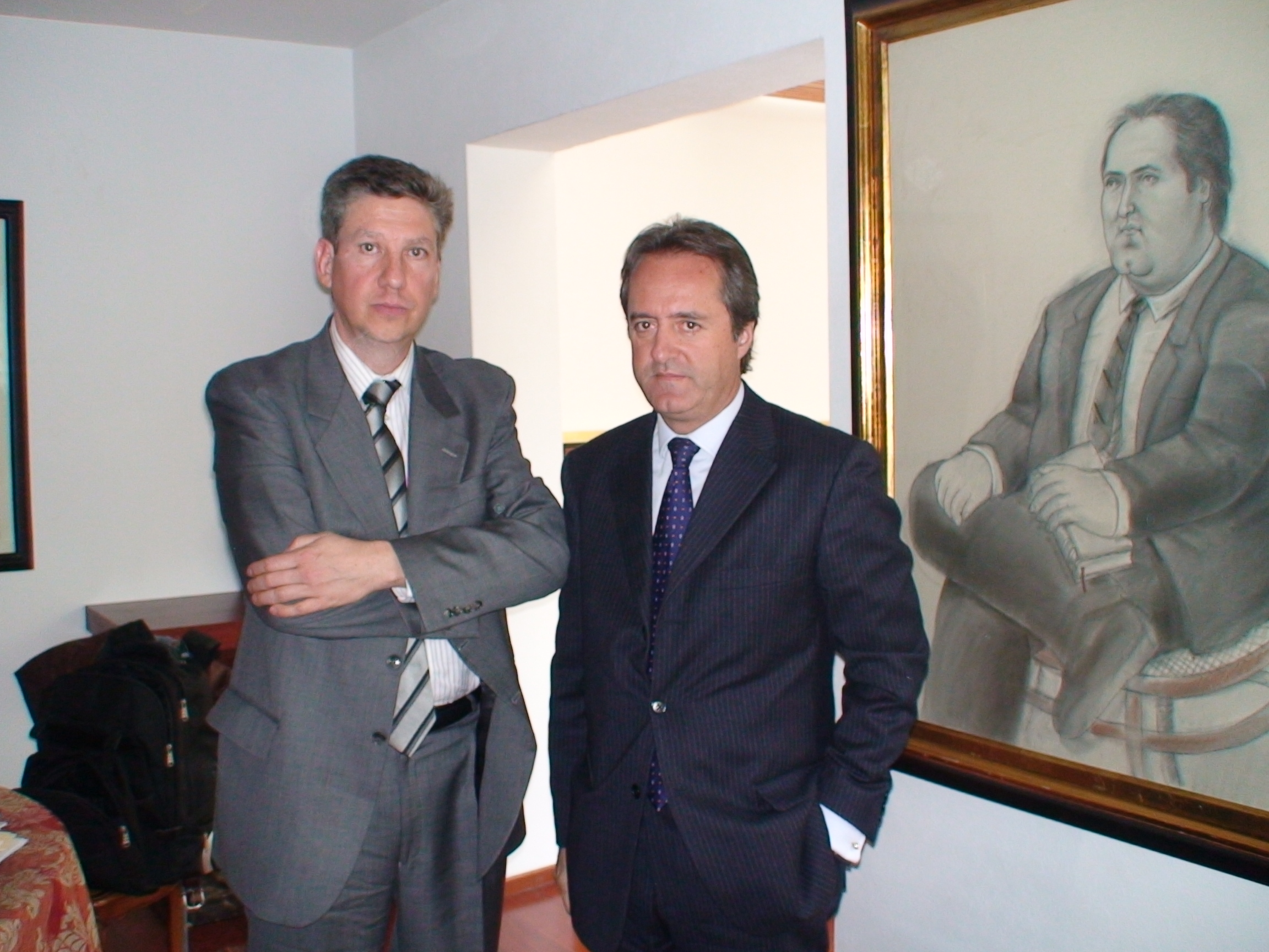 Raúl Benoit con Fernando Botero, ex ministro de defensa de Colombia.